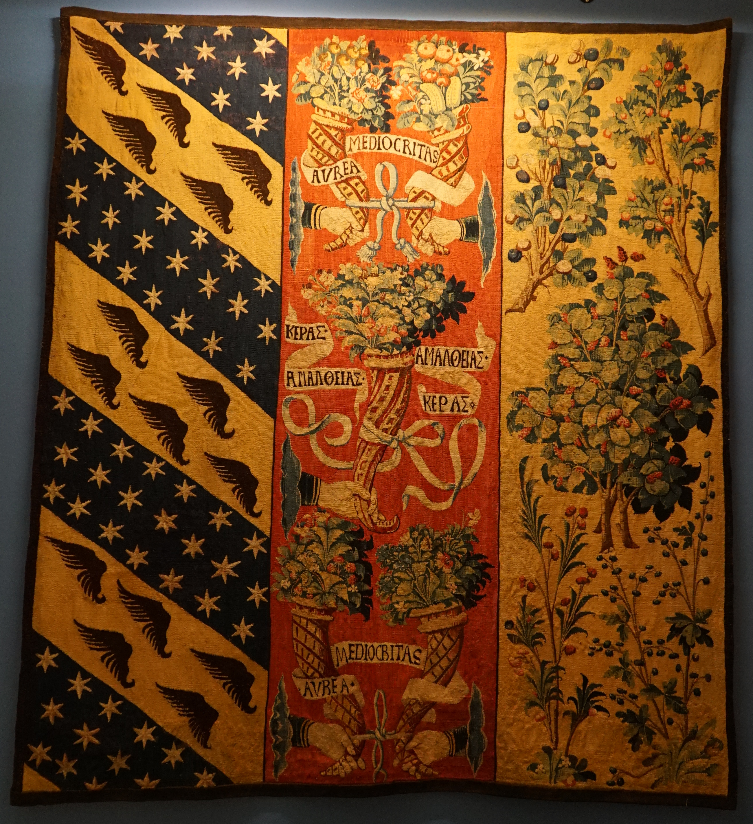 présenté au musée st-Remi, conservé sous la cote Cl.22613.